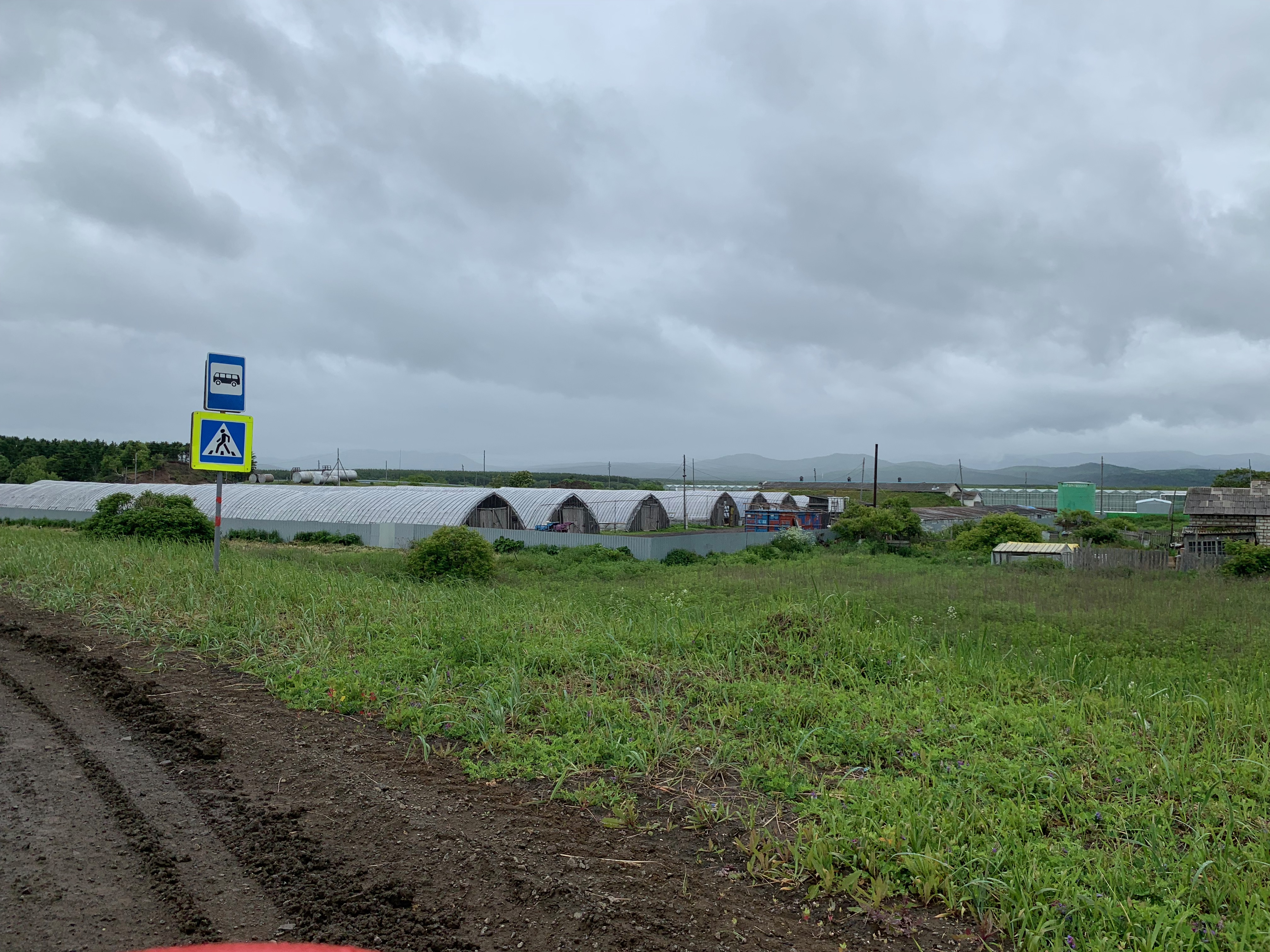 Заречное Сахалин Теплицы